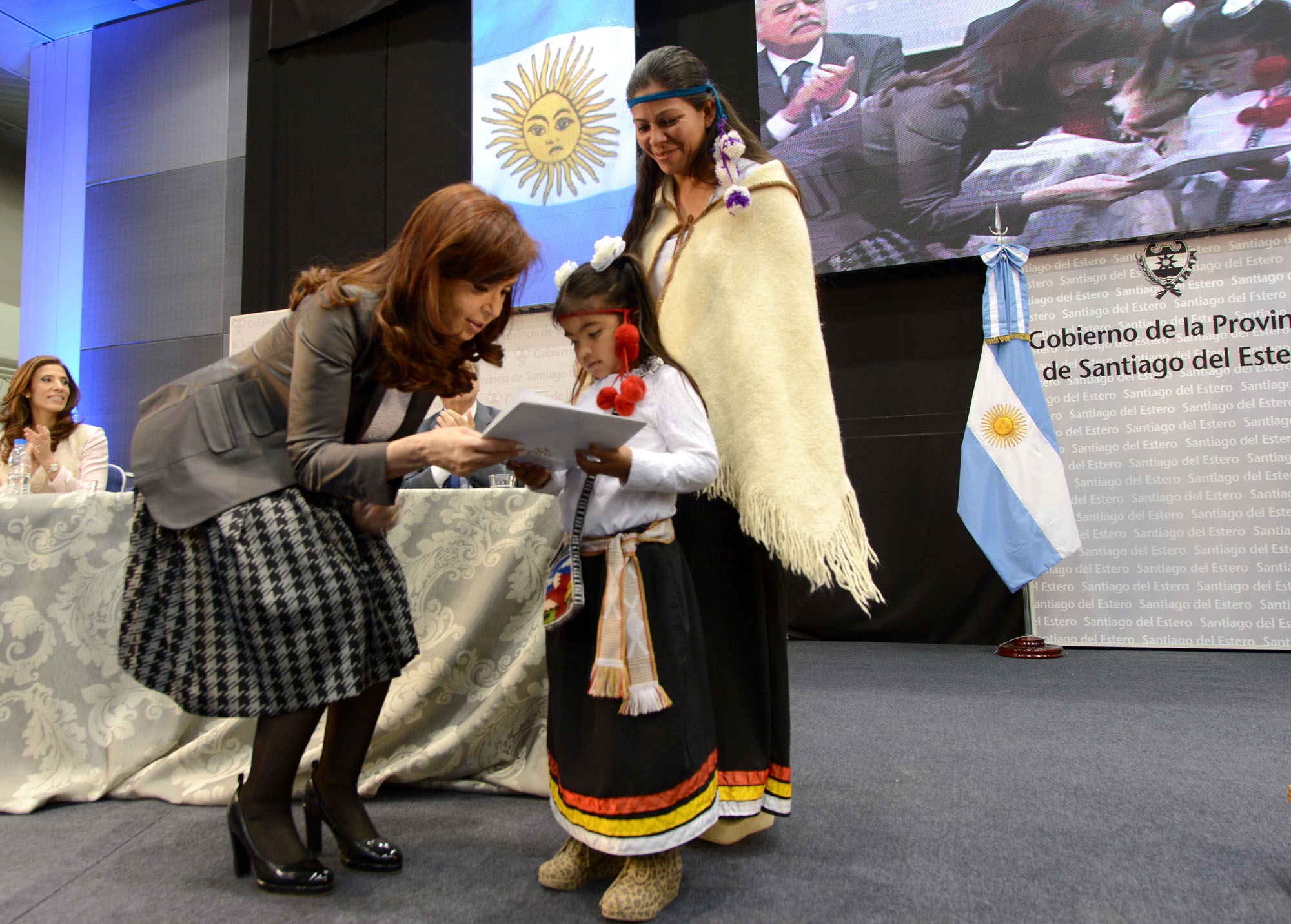 La presidenta argentina Cristina Fernández entrega viviendas a miembros de pueblos originarios en el acto realizado en el Centro de Convenciones y Exposiciones Forum de Santiago del Estero.